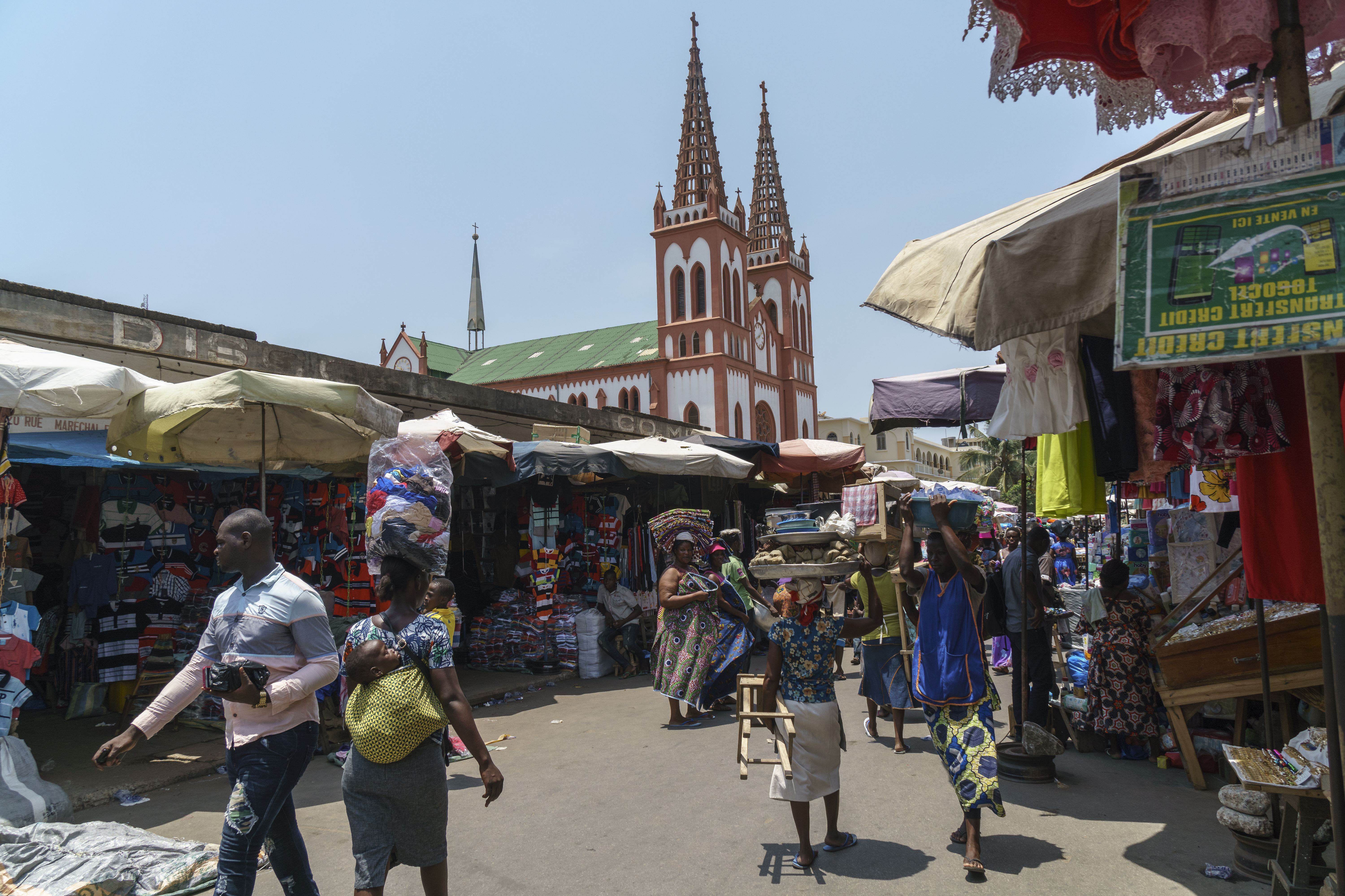 The Lomé Grand Marché with the Cathédrale du Sacré Coeur. Lomé, Togo